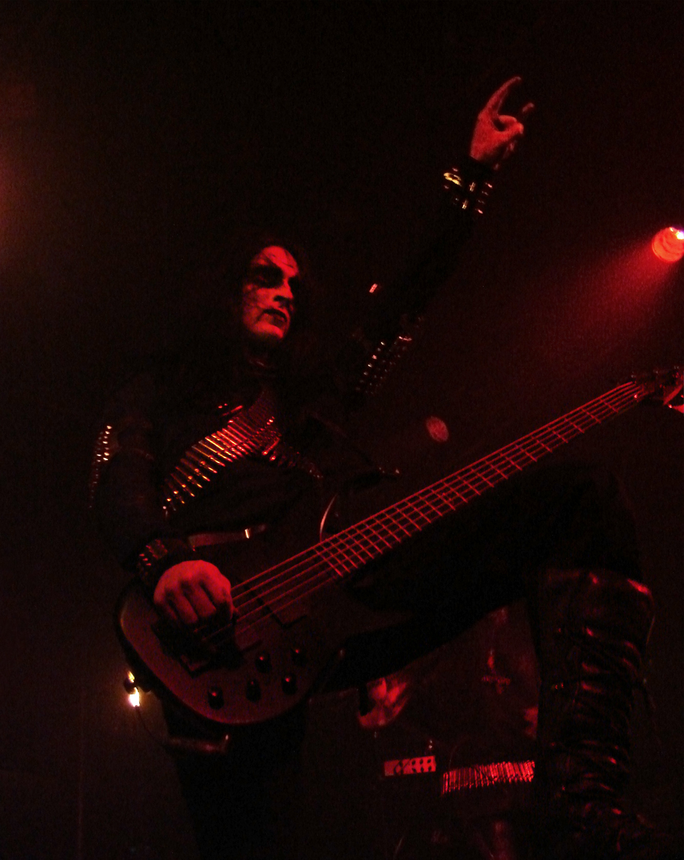 Gorgoroth, concert du 20/11/07 à la Locomotive à Paris.King.